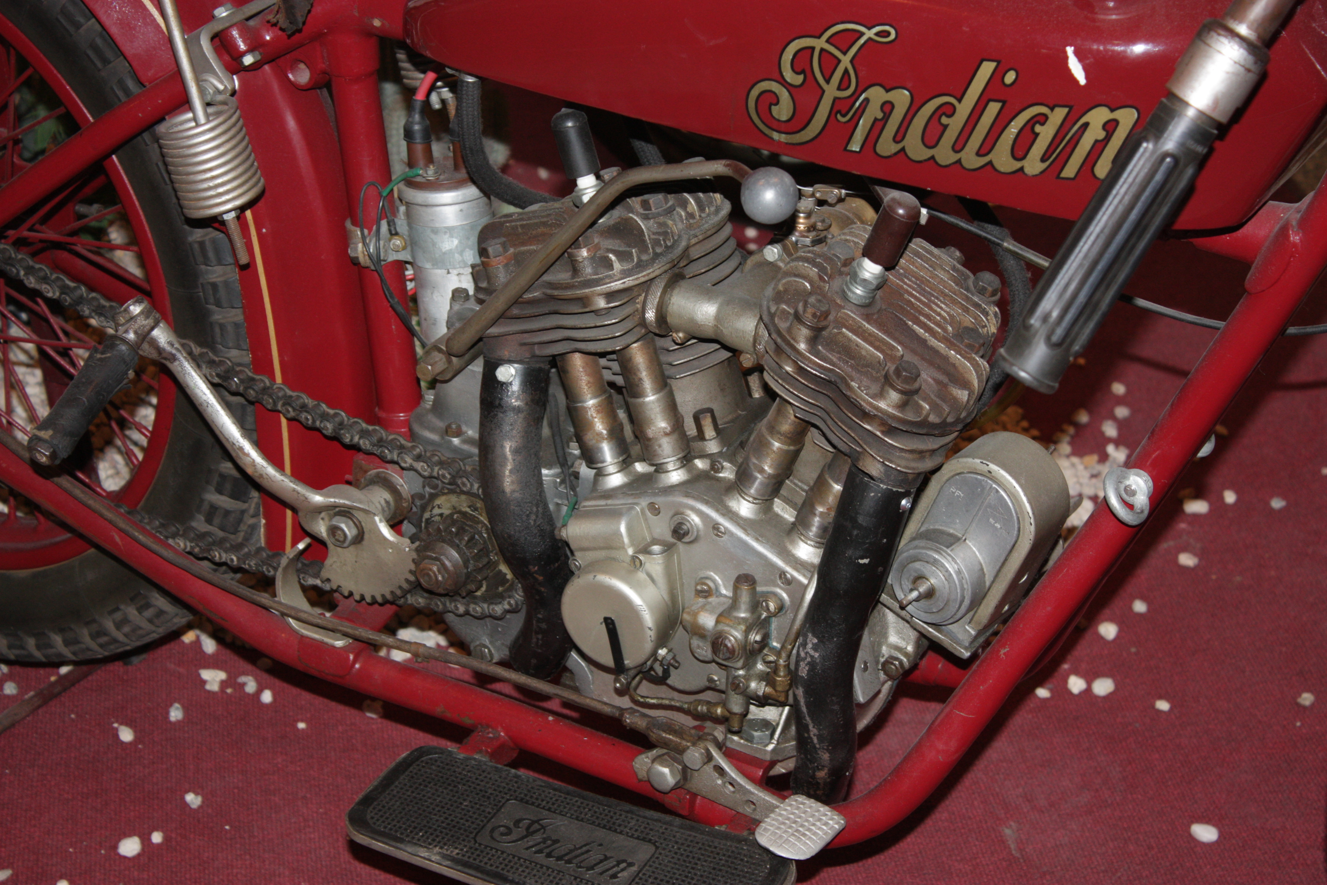 Harley Davidson - Harley Davidson Ausstellung Berlin Ostbahnhof Indian Race, Baujahr 1926, 12PS, 600ccm